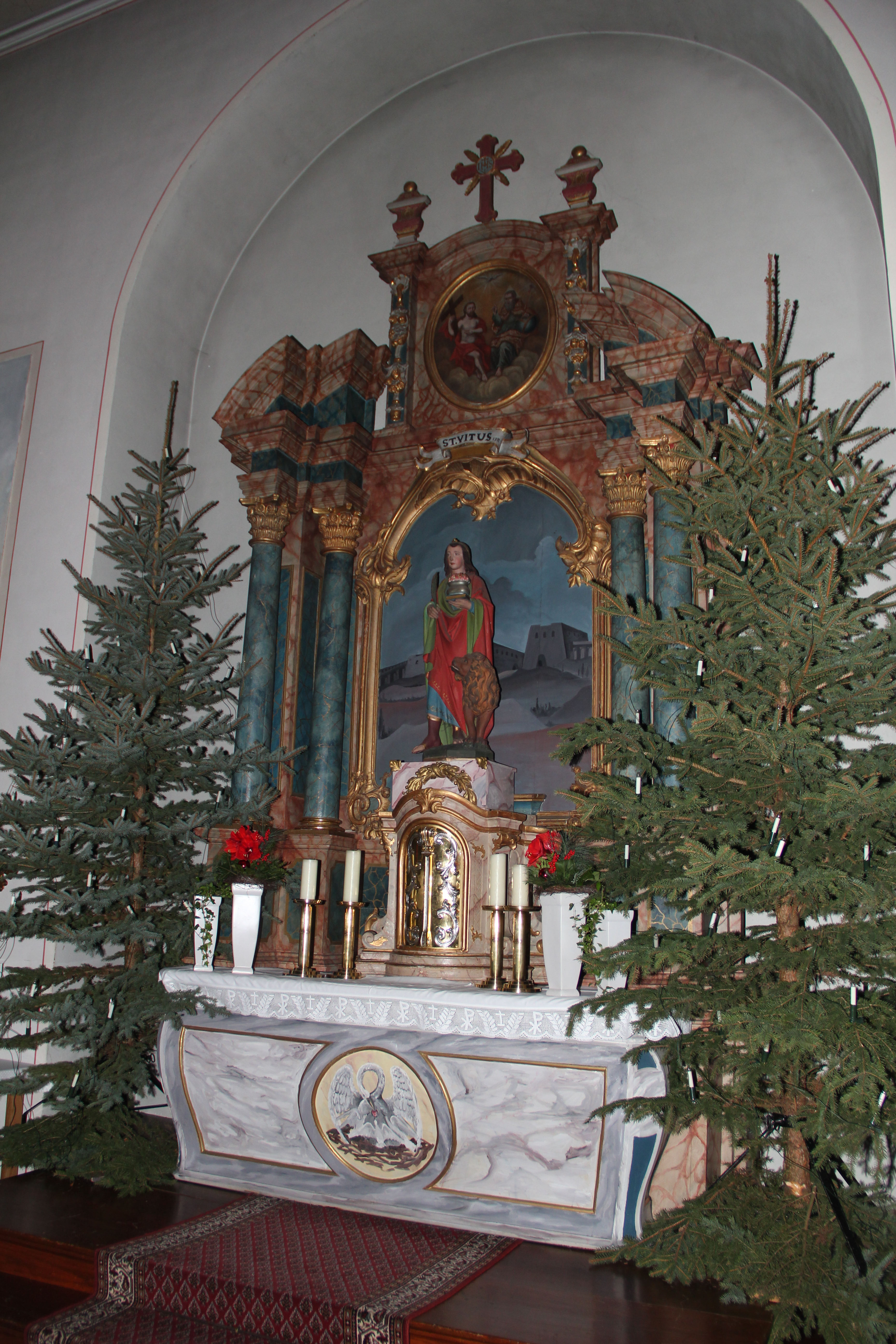 Hochaltar in der St. Vituskirche in Bühne